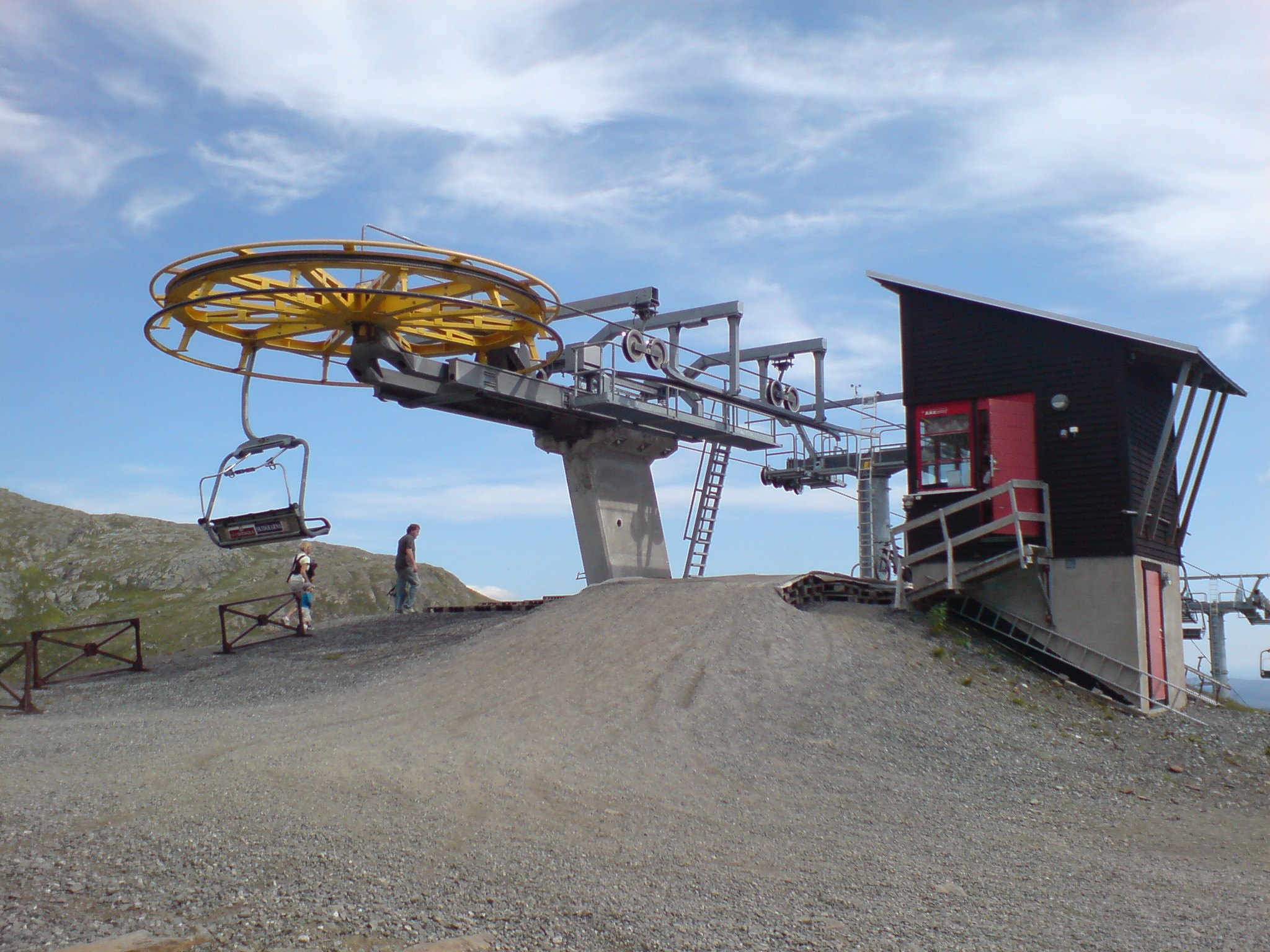 Hummelliften in Åre